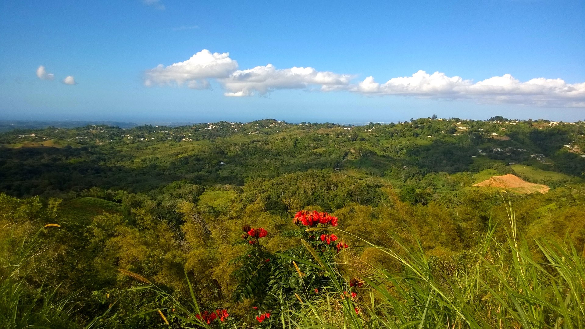 Barrio Palos Blancos, Corozal, Puerto Rico (2016)